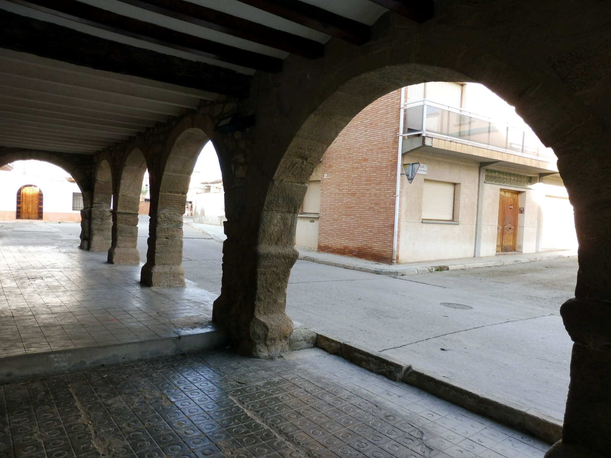 Casa senyorial (Bellcaire d'Urgell): porxos